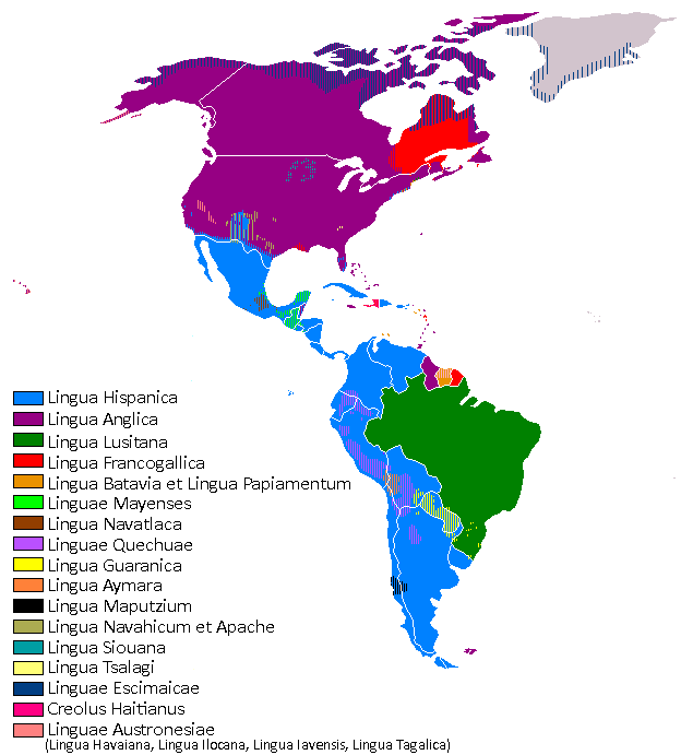 A map of major languages in the Americas in latin language